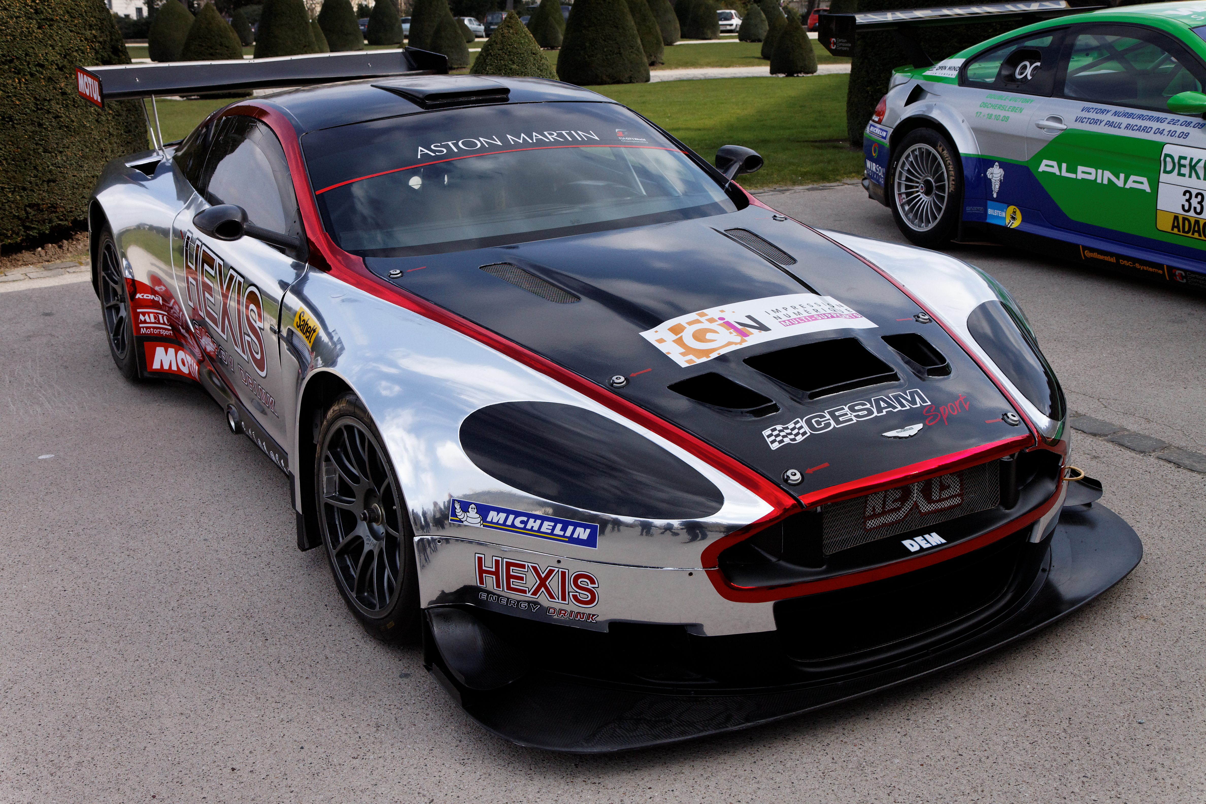 Photographie prise lors de la présentation du Blancpain Endurance series aux Invalides à Paris en mars 2011.